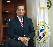 Rector (UNPHU)